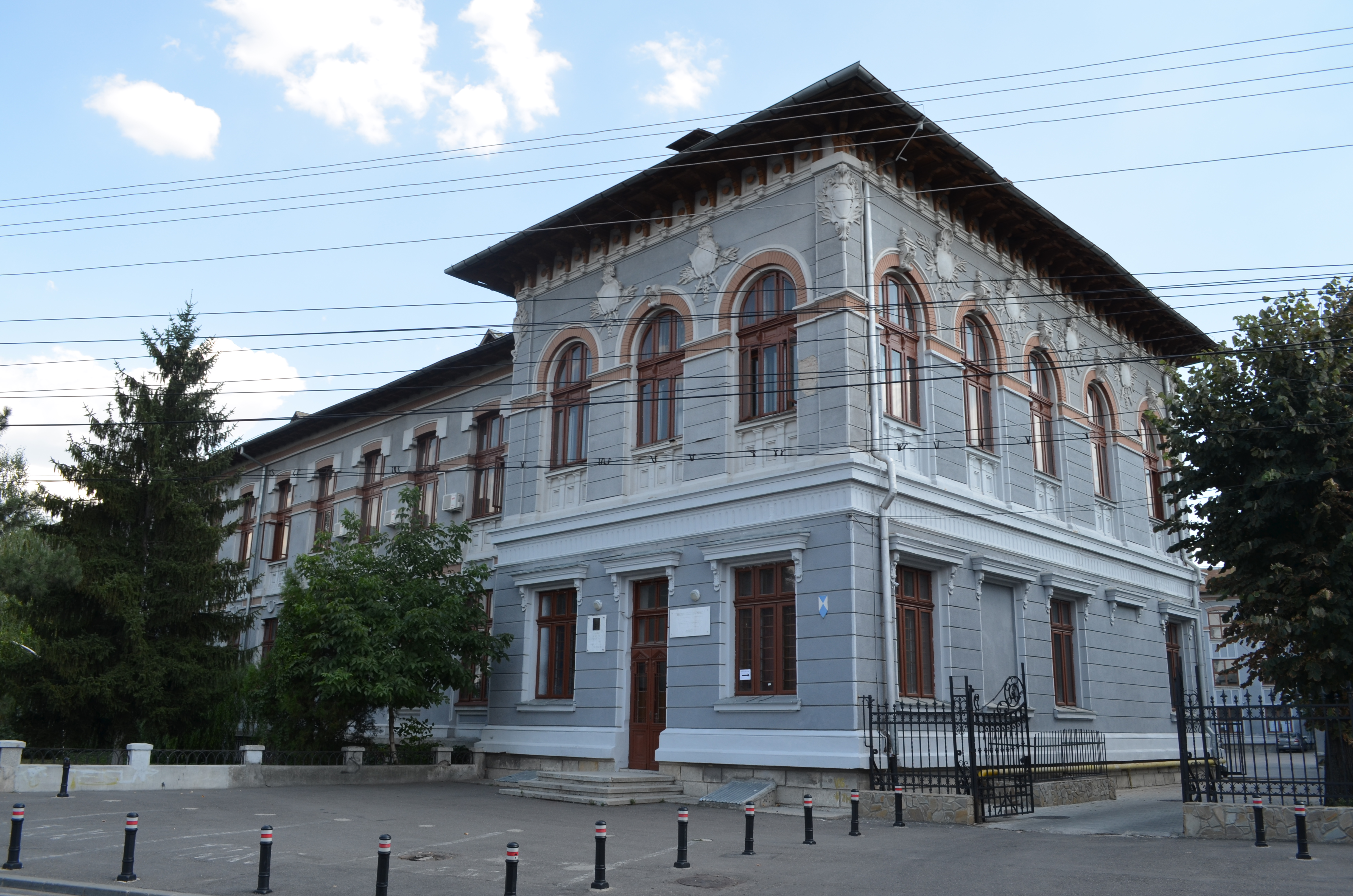 Liceul "Sf. Petru și Pavel", azi Colegiul Național "Mihai Viteazul", Ploiești